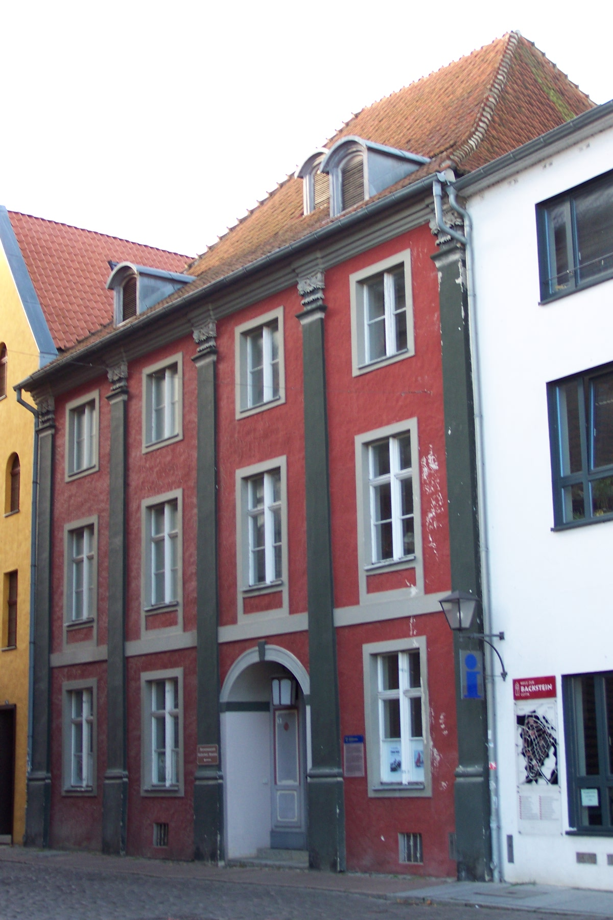 Stralsund, Ossenreyerstraße 1